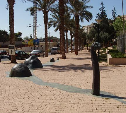 המפלצת מלוך נס, פסל רחוב בהרצליה, צילם דוד שי